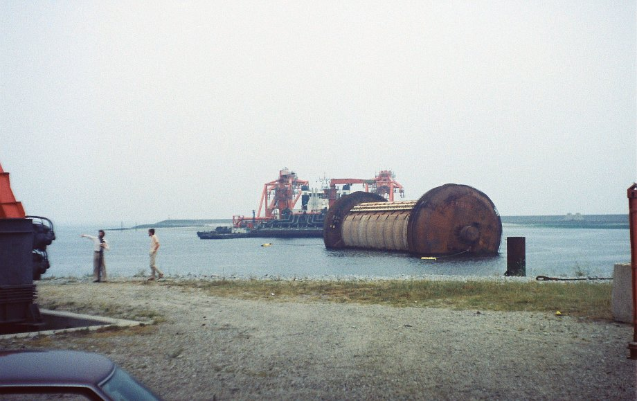 Der Mattenleger Cardium, der die Gründungsmatten für das Oosterschelde-Sturmflutwehr verlegte